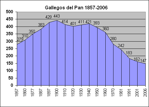 Población de Gallegos del Pan (Zamora) entre 1857 y 2006